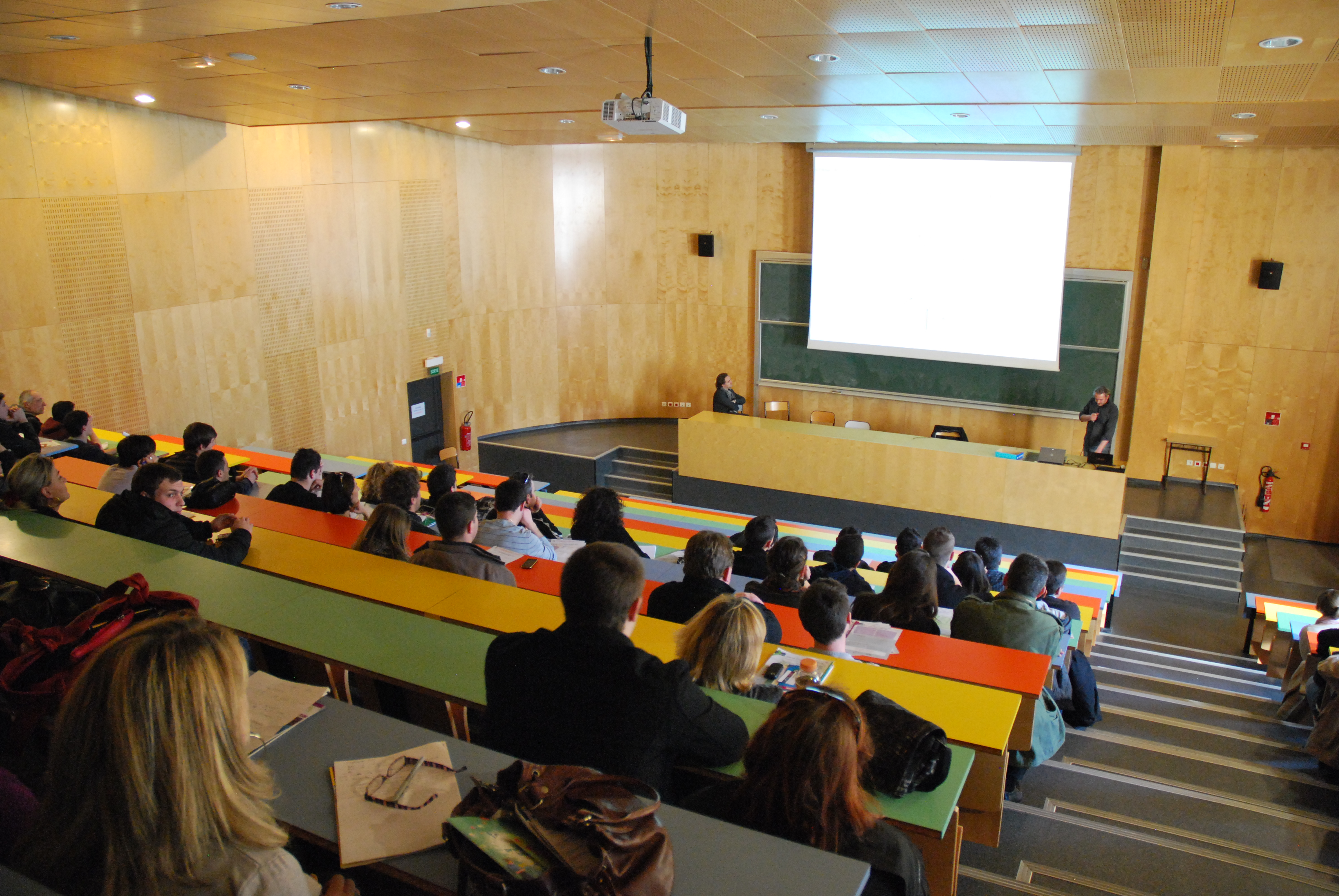 Institut Universitaire de Technologie de Nîmes - Amphithéâtre 3